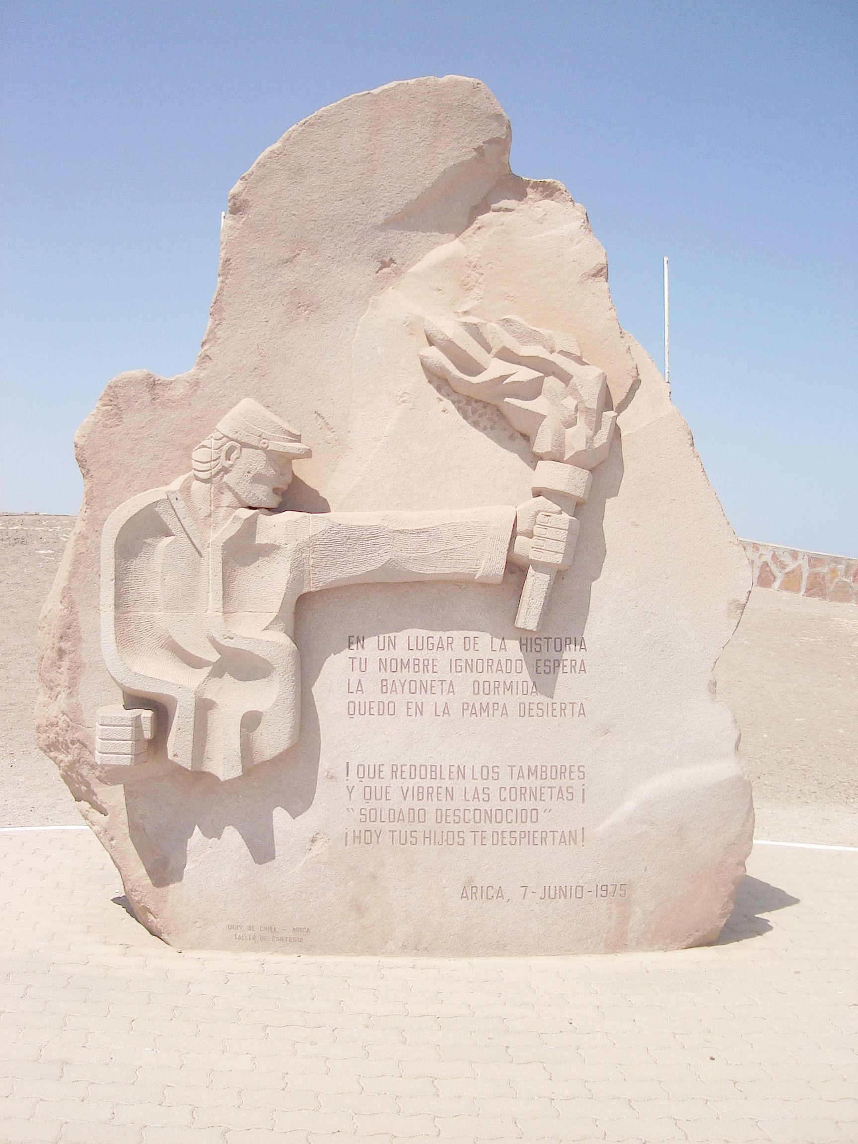 Foto tirada por mim, em Arica.